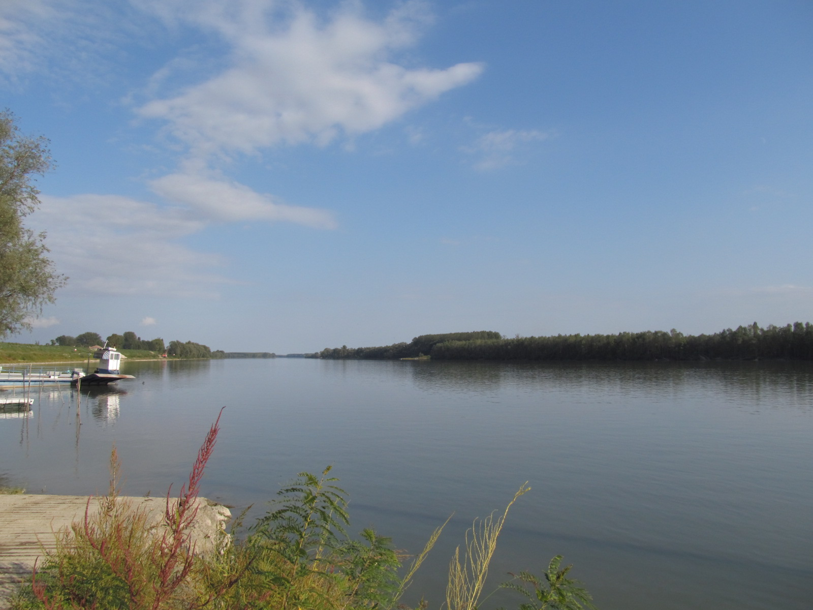 Canalnovo This is a photo of a monument which is part of cultural heritage of Italy. The authorisation for taking photos of this object was provided by the World Wide Fund for Nature Italy.